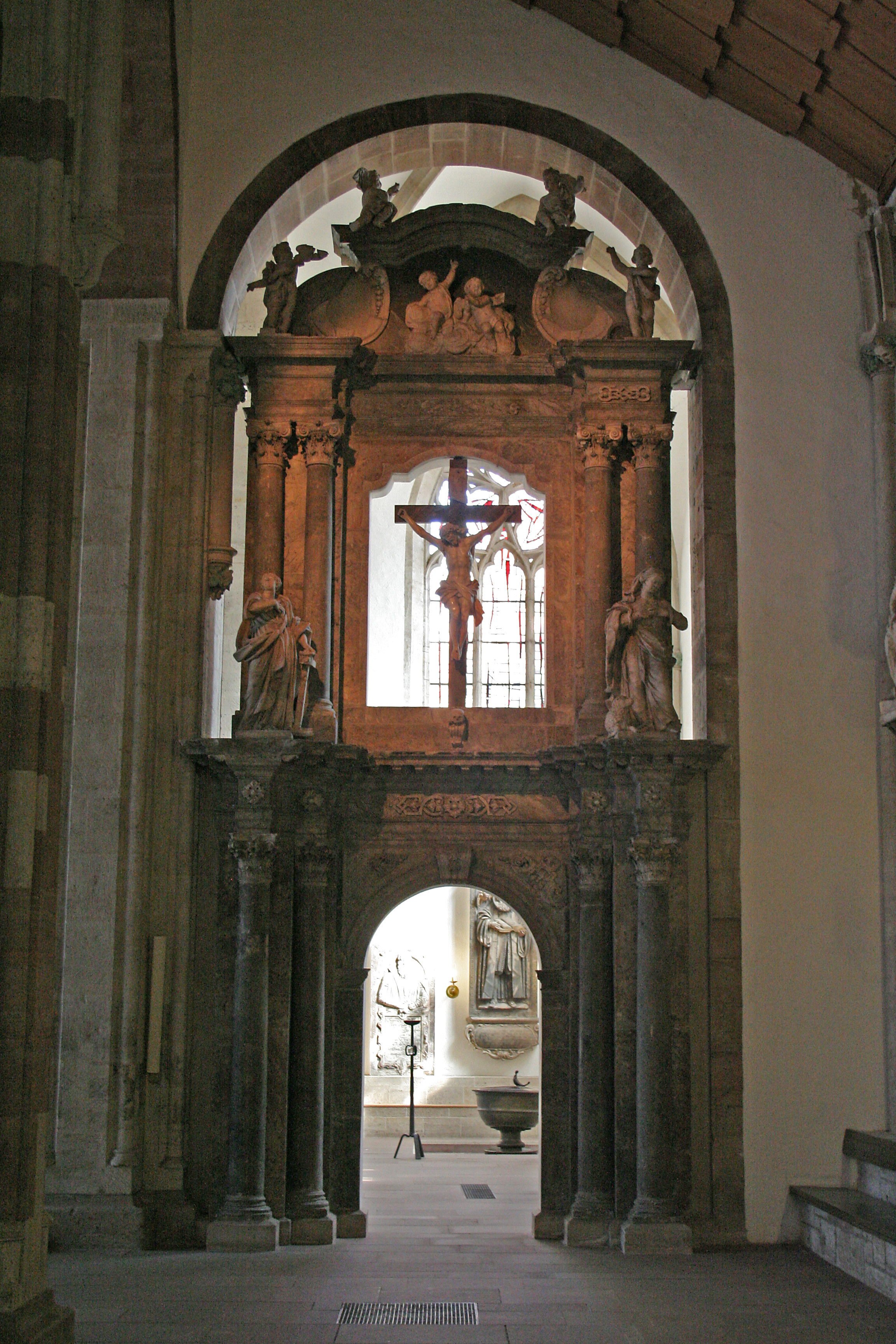 Magnikirche in Braunschweig, Hochaltar von Jenner und Vetten (1730/34)